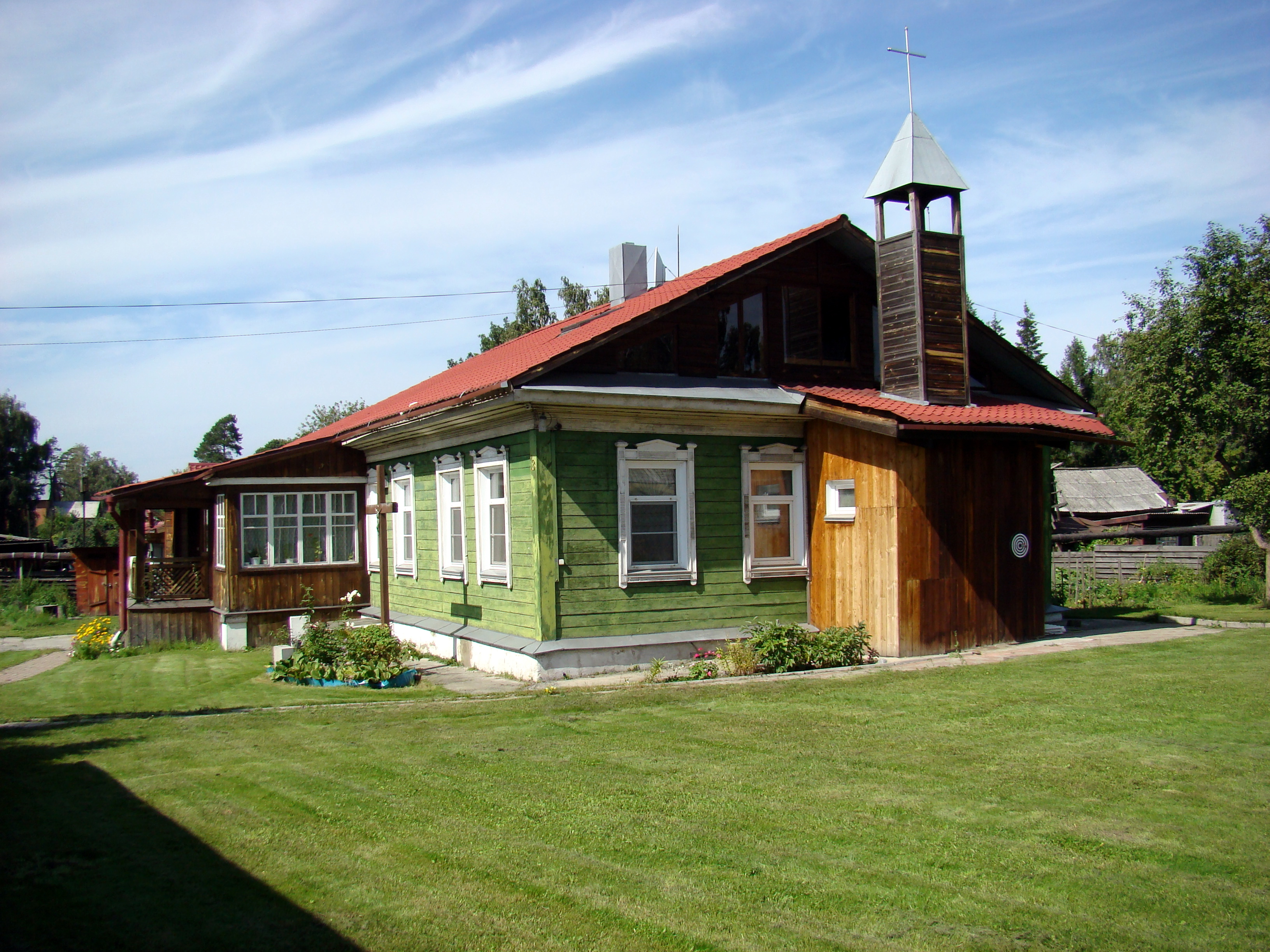 Kaplica od 1999 roku, obecnie dom zakonny w parafii rzymsko-katolickiej w Bijsku, Kraj Ałtajski, Rosja.